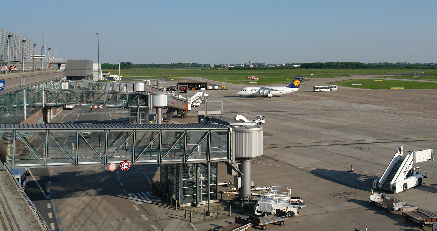 Flughafen Bremen in der Airport City: Vorfeld, im Hintergrund der Radarturm